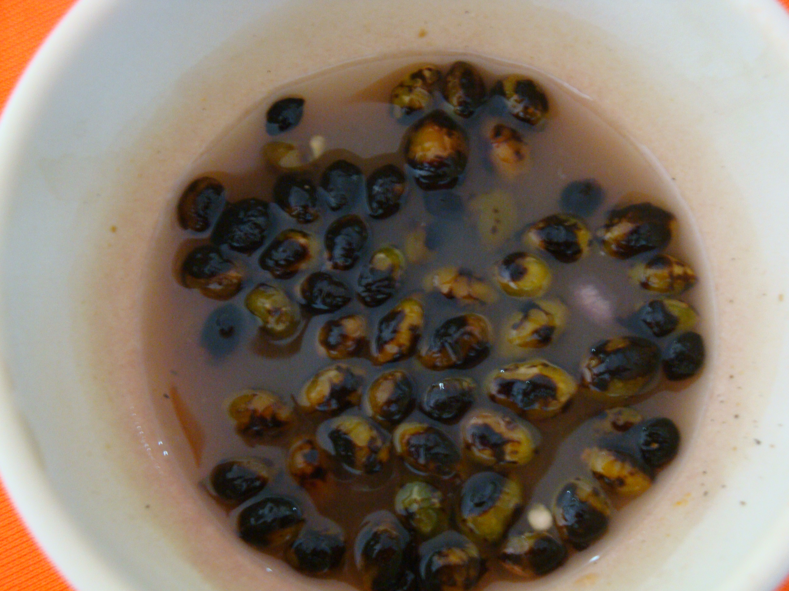 Salsa de chile amashito asado, un ingrediente escencial para acompañar los platillos típicos de la cocina del estado de Tabasco, México.